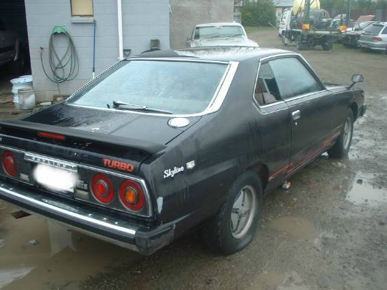 1981 Nissan Skyline